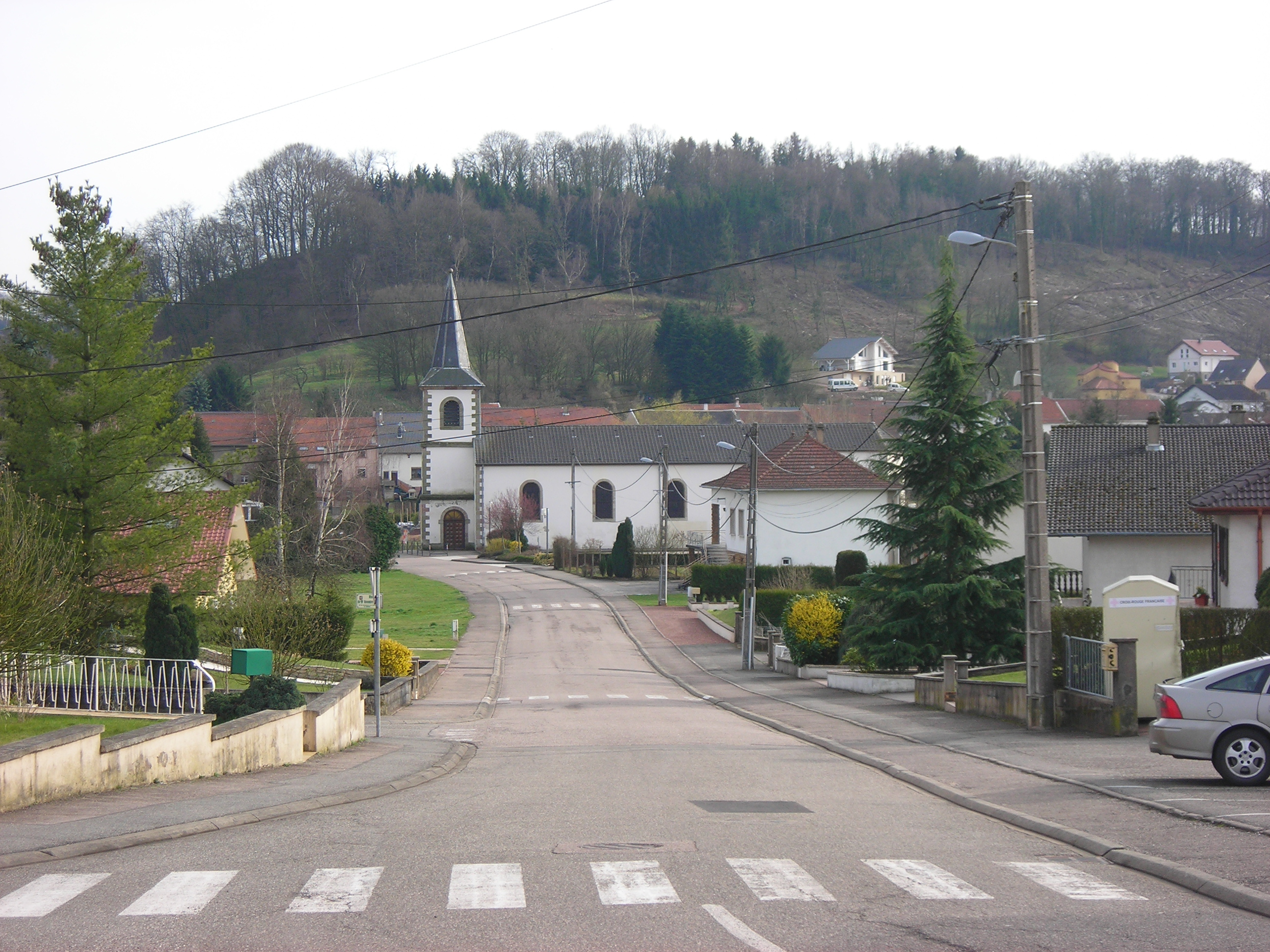 Eglise St. Blaise, Varsberg, Moselle, Lorraine, France